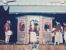 பிரித் கொட்டுவ - இலங்கை பௌத்த மக்களின் மத அனுஸ்டான மரபு முறைகளில் ஒன்று. பிரித் எனப்படும் வேதம் ஓதப்படும் போது அமைக்கப்படும் விசேட அலங்காரக்கூடு. இதற்குள் அமர்ந்த படியே பௌத்த மத குருமார் வேதம் ஓதுவர்.